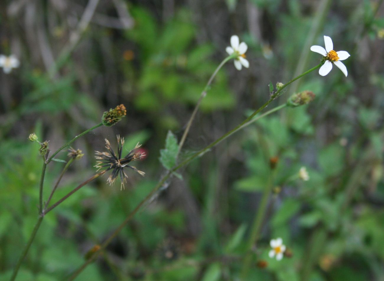 Bidens pilosa s.lat., Korbblütler (Asteraceae) - Costa Rica: Prov. Cartago, Orosi